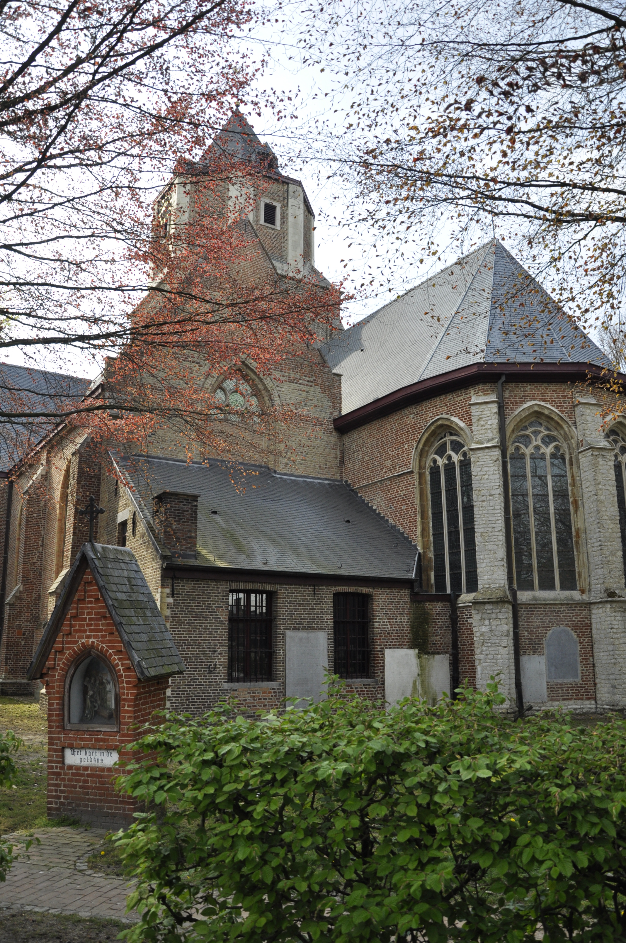 De Sint-Barbarakerk te Maldegem, België